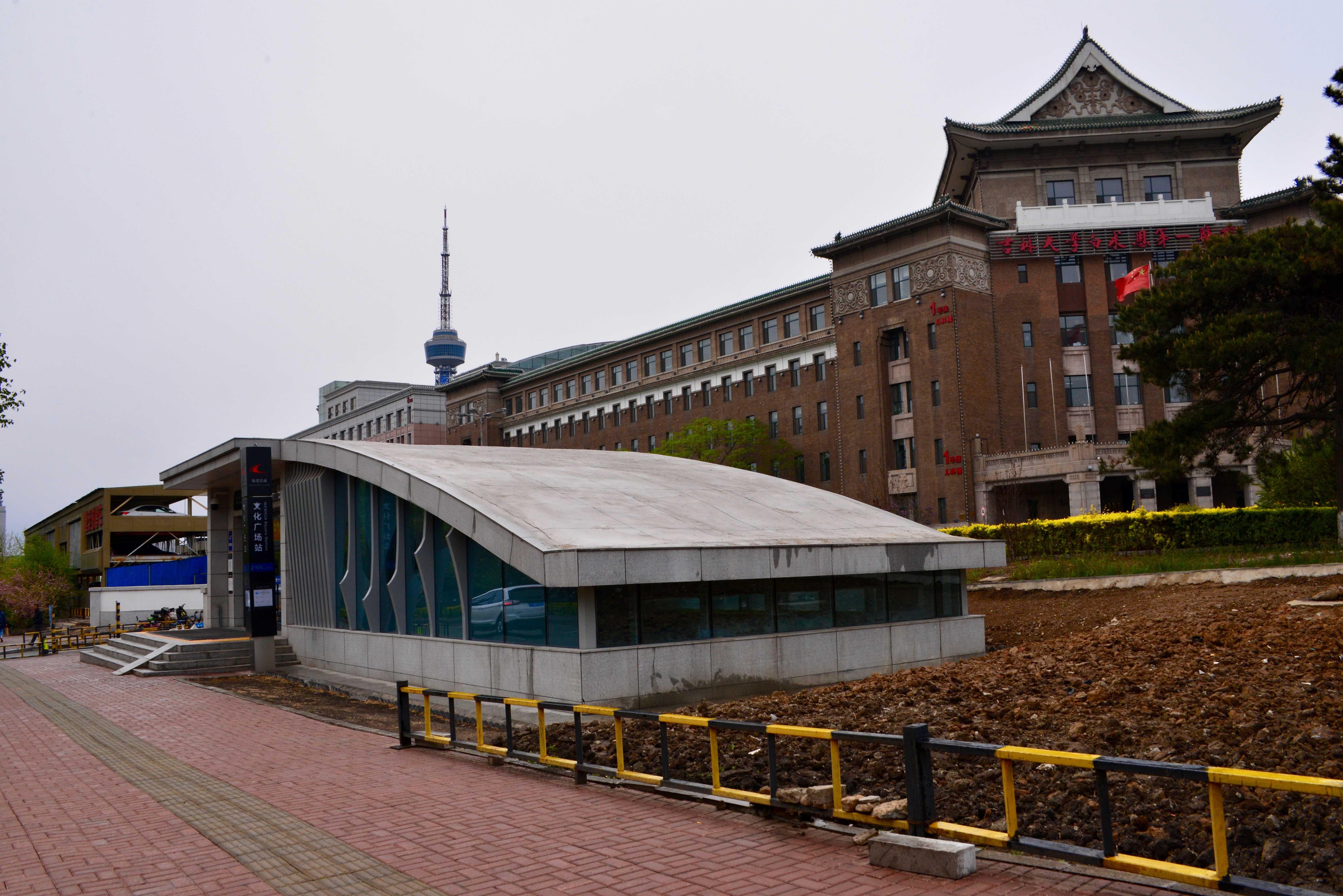 中文（中国大陆）: 长春轨道交通2号线文化广场站